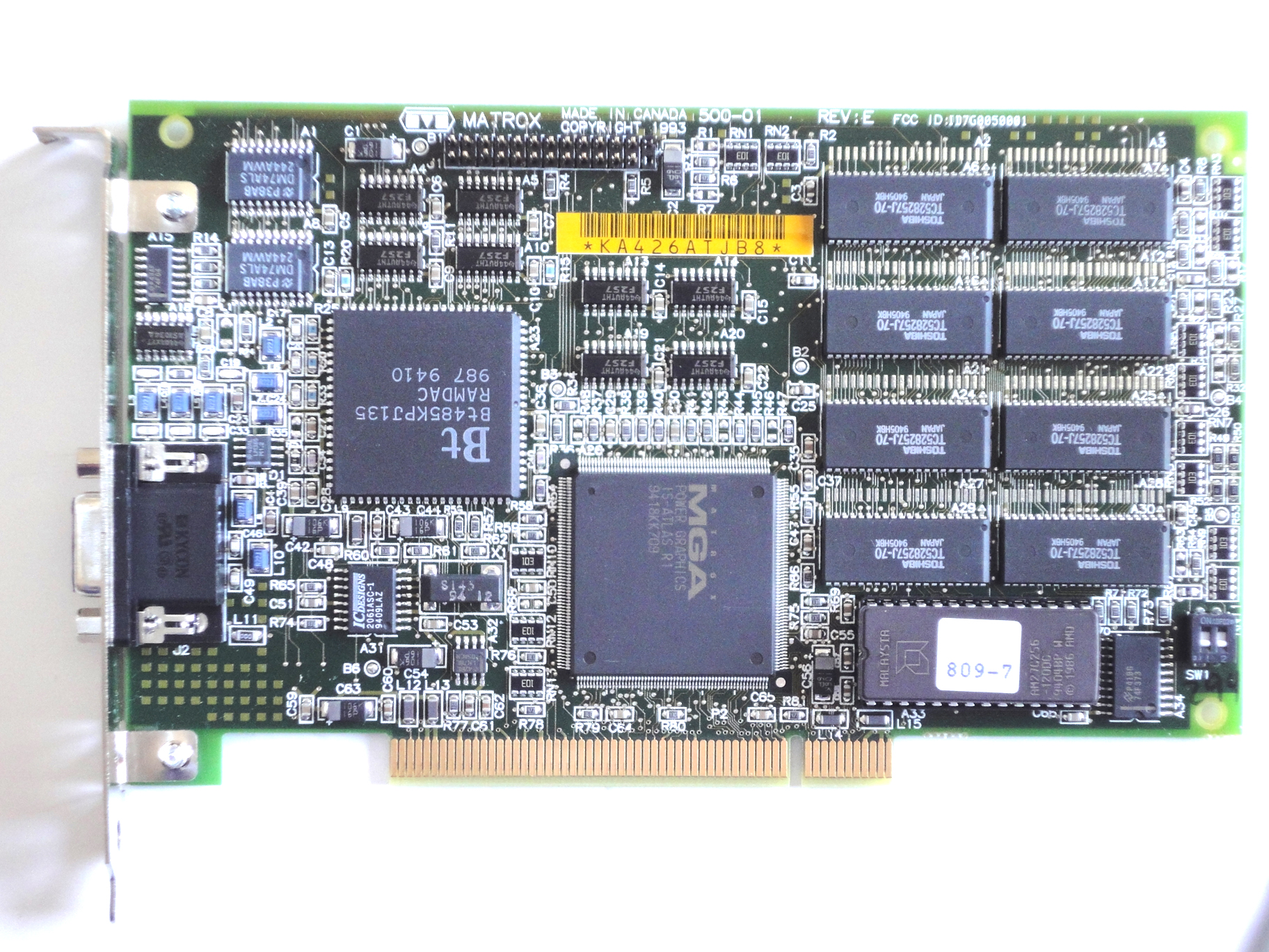 Matrox MGA